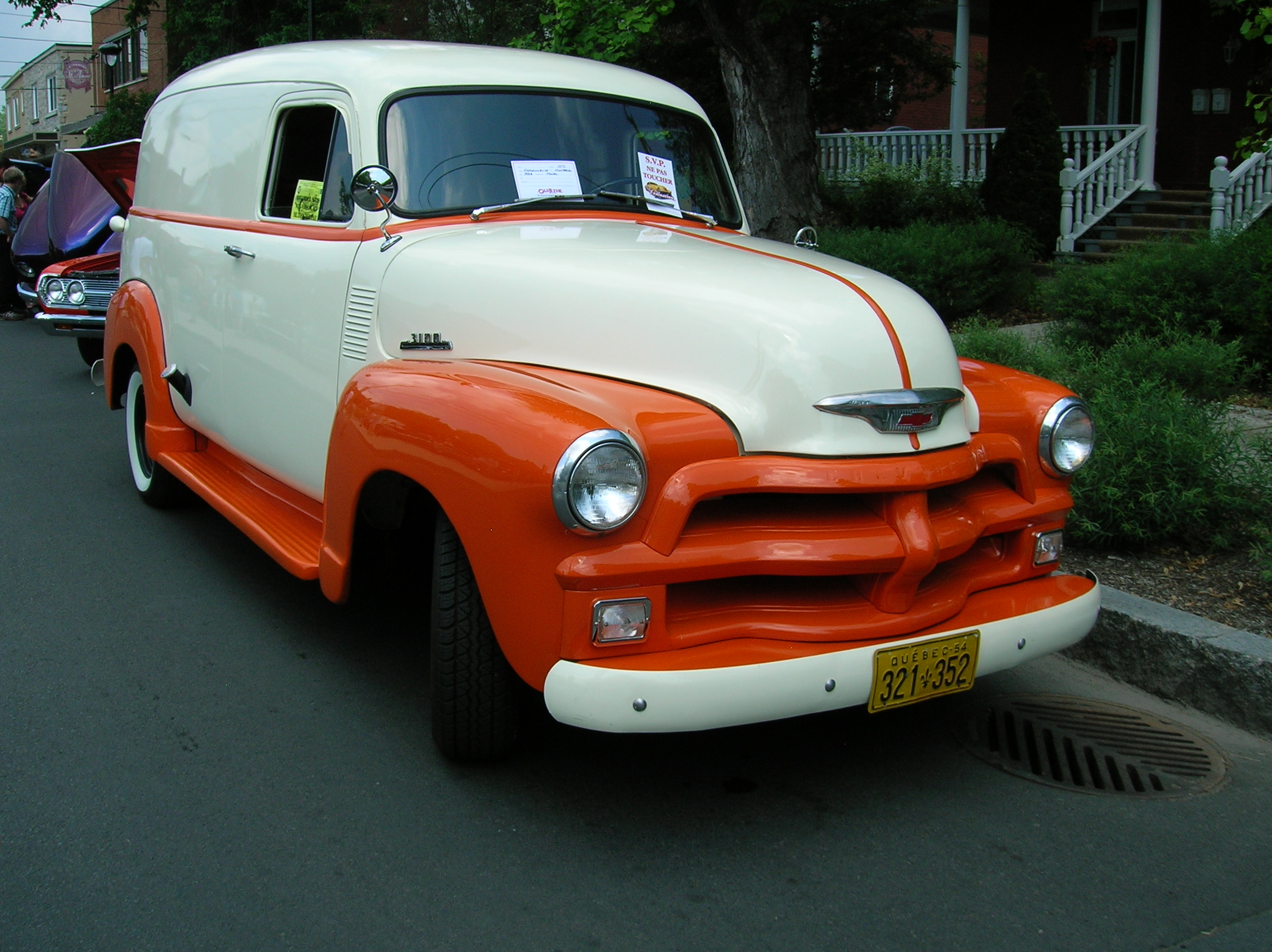 1954 Chevrolet Advance Design 3100 Panel van